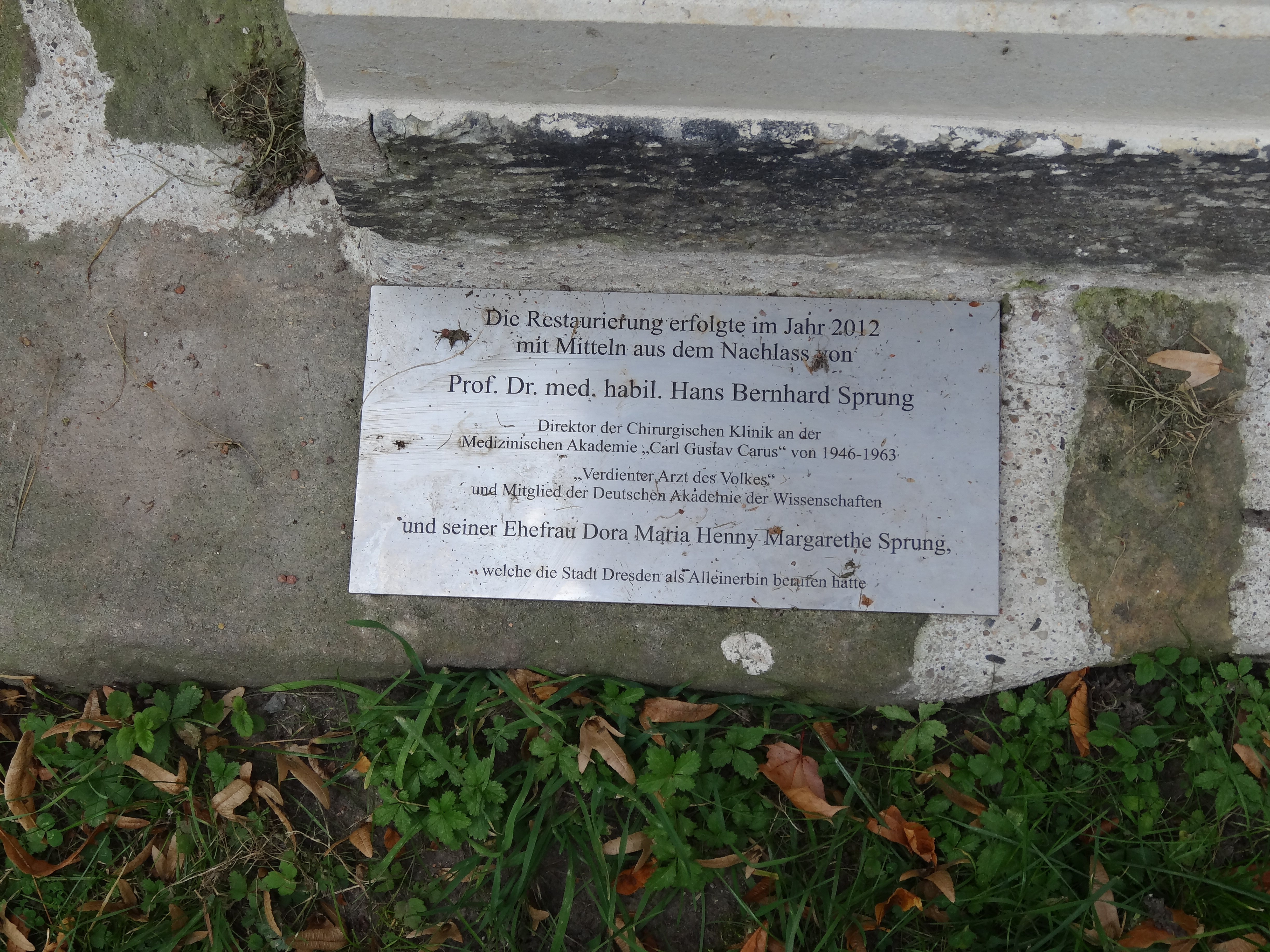 Inschrift an einer Gartenvase im Dresdner Blüherpark: Die Restaurierung erfolgte im Jahr 2012 mit Mitteln aus dem Nachlass von Prof. Dr. med. habil. Hans Bernhard Sprung Direktor der Chirurgischen Klink an der Medizinischen „Akademie Carl Gustav Carus“ von 1946-1963 „Verdienter Arzt des Volkes“ und Mitglied der Deutschen Akademie der Wissenschaften und seiner Ehefrau Dora Maria Henny Margarethe Sprung, welche die Stadt Dresden als Alleinerbin berufen hatte